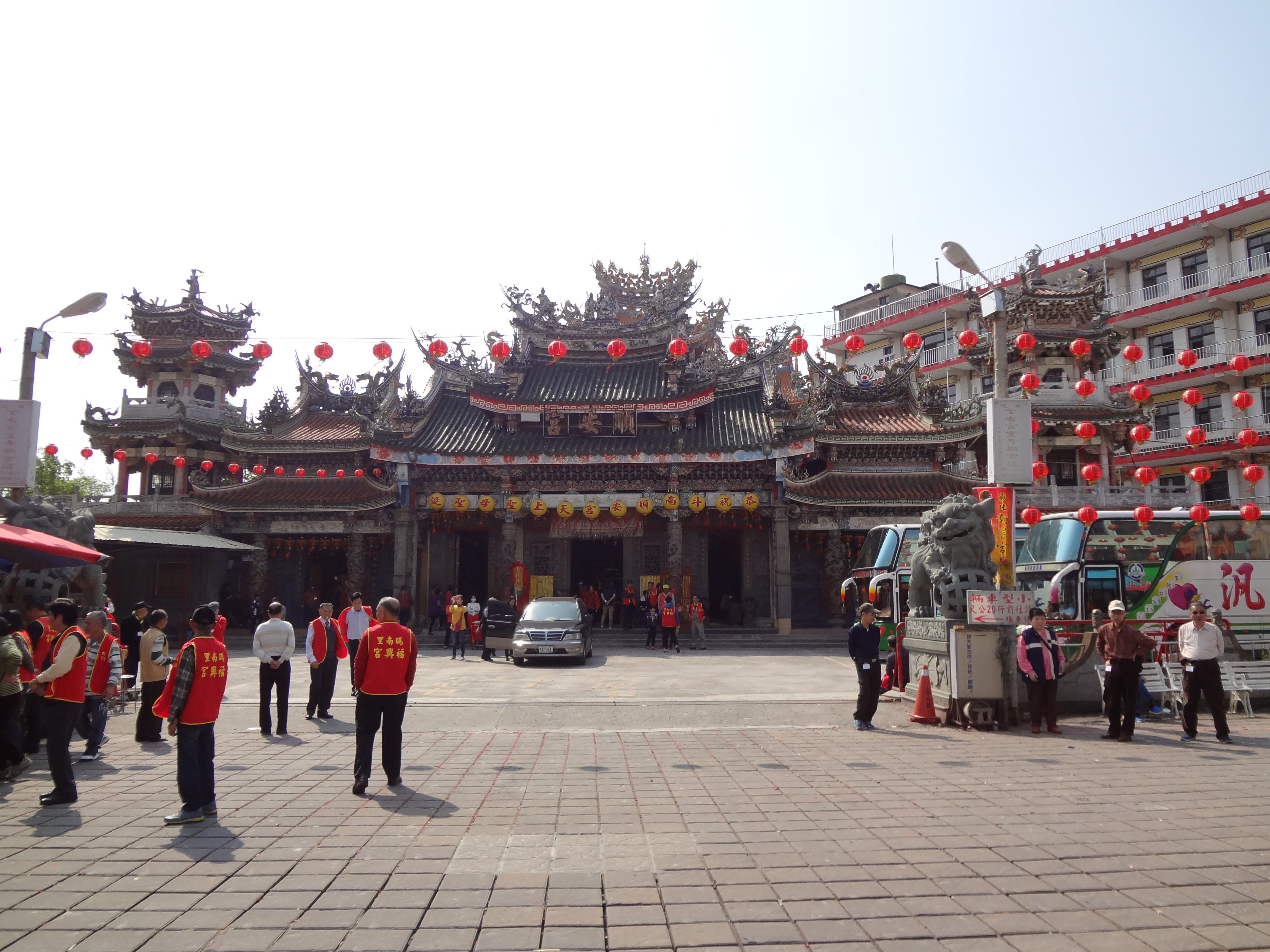 中文（台灣）: 臺灣雲林縣斗南鎮斗南順安宮。